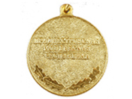 PMR state order